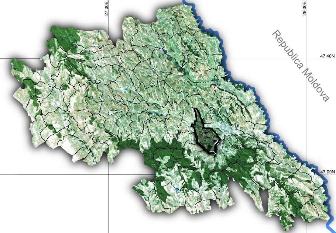 Miroslava jud Iasi.